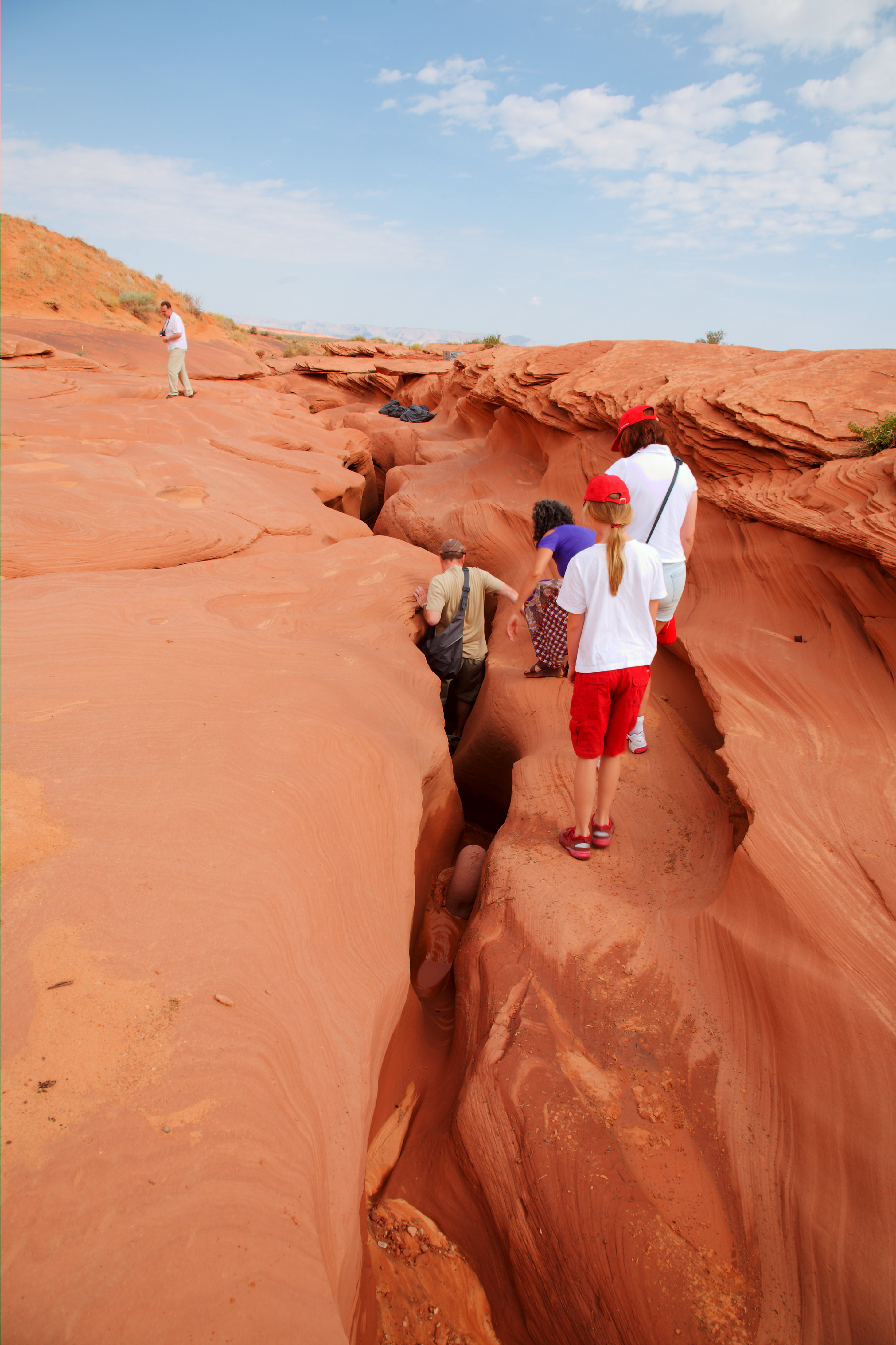 Einstieg in den Lower Antelope Canyon